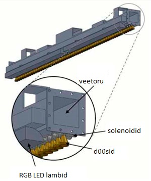 komponent